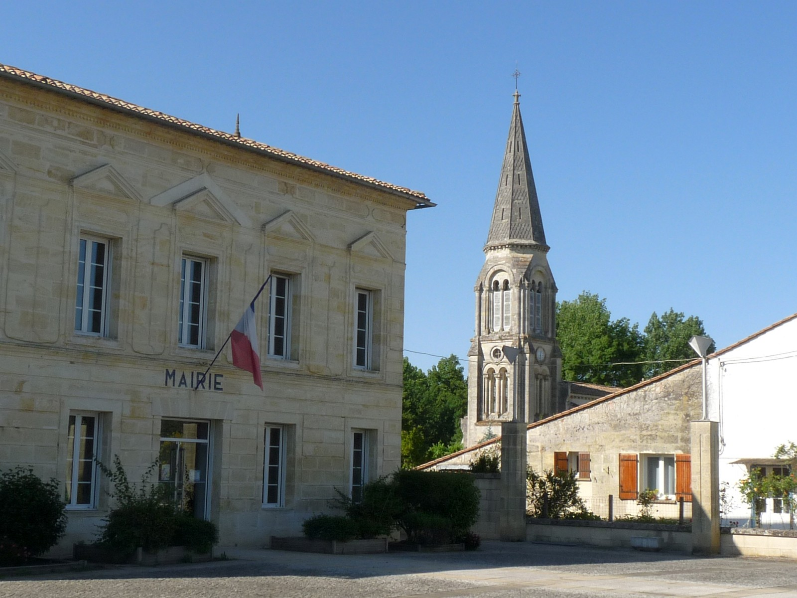 Eglise et mairie, Sablons, Gironde, France